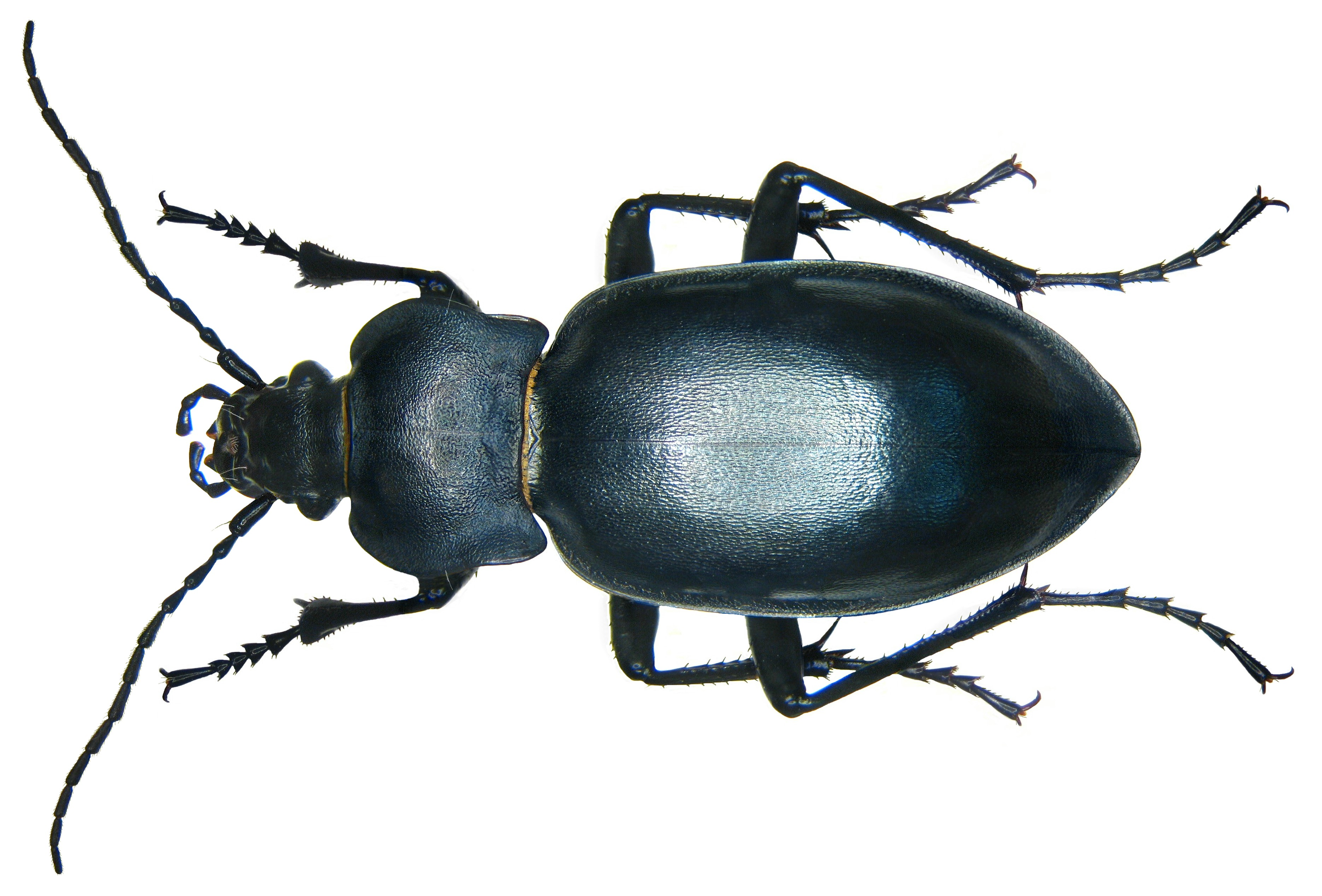 Familie: Carabidae Grösse: 22-34 mm Verbreitung: Mitteleuropa, Nordeuropa, Osteuropa bis Sibirien Ökologie: Waldbewohner Fundort: Germania, Oberfranken, Kulmbach leg.det. U.Schmidt, 1974 Foto: U.Schmidt, 2008